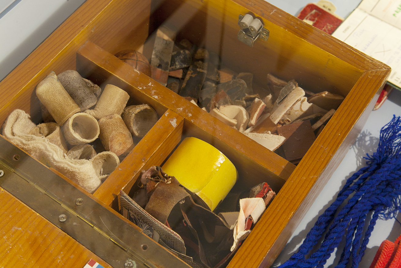 Fotografies d'Hèctor Juan de l'exposició temporal del Museu Valencià d'Etnologia "Faixa roja, faixa blava".